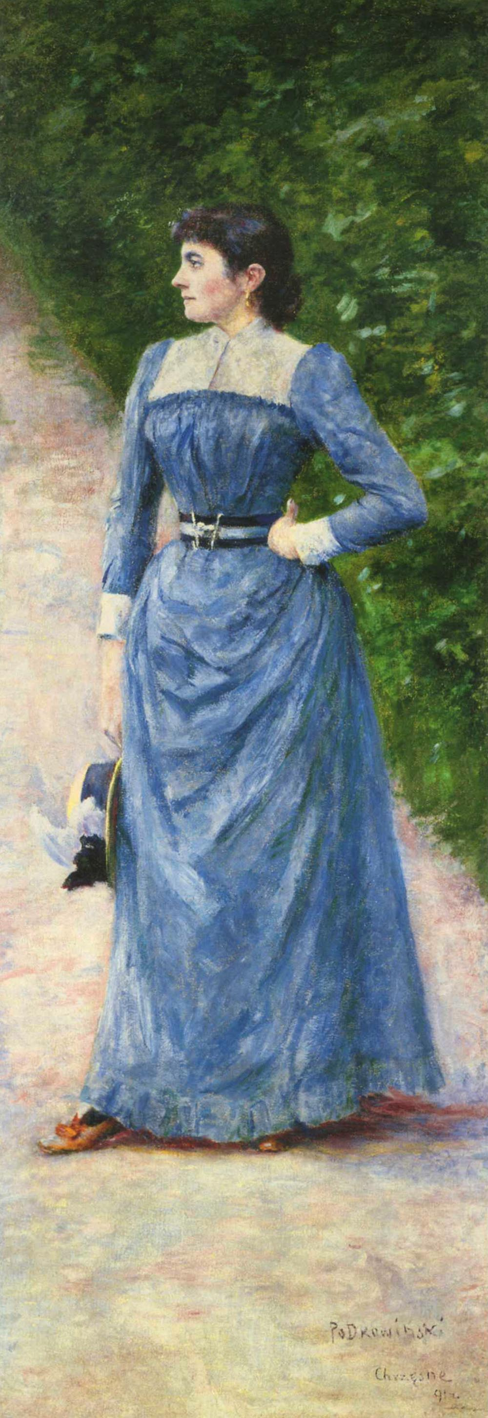 Portret Wincentyny Karskiej